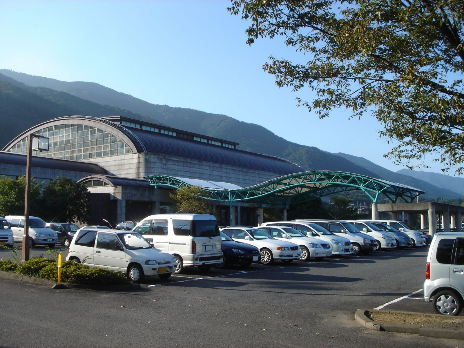 （池田町総合体育館）,Ikeda,Gifu,Japan(岐阜県池田町)で撮影。